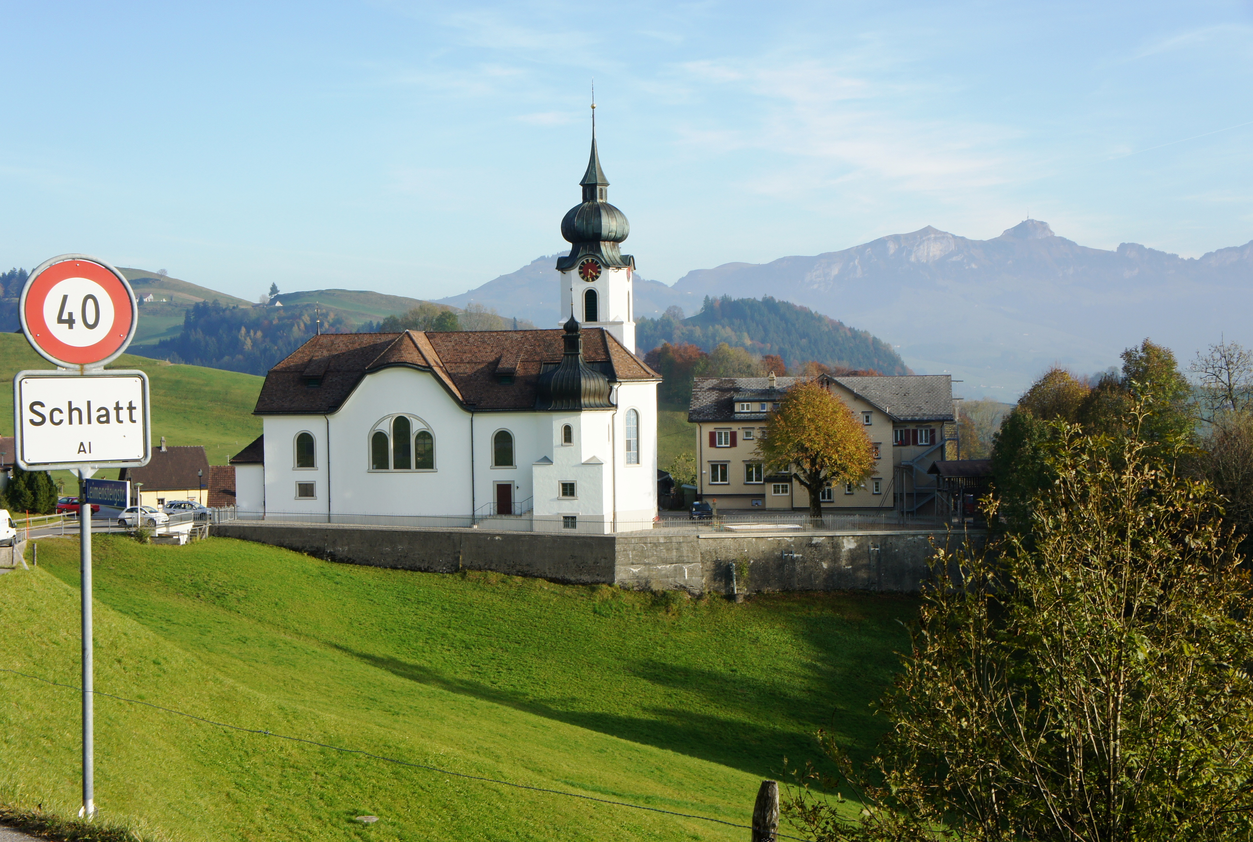 Blick aus Norden auf die Kirche in Schlatt. Links im Bild das Ortsschild von Schlatt AI. Im Hintergrund der Berg Kamor und rechts davon Hoher Kasten.